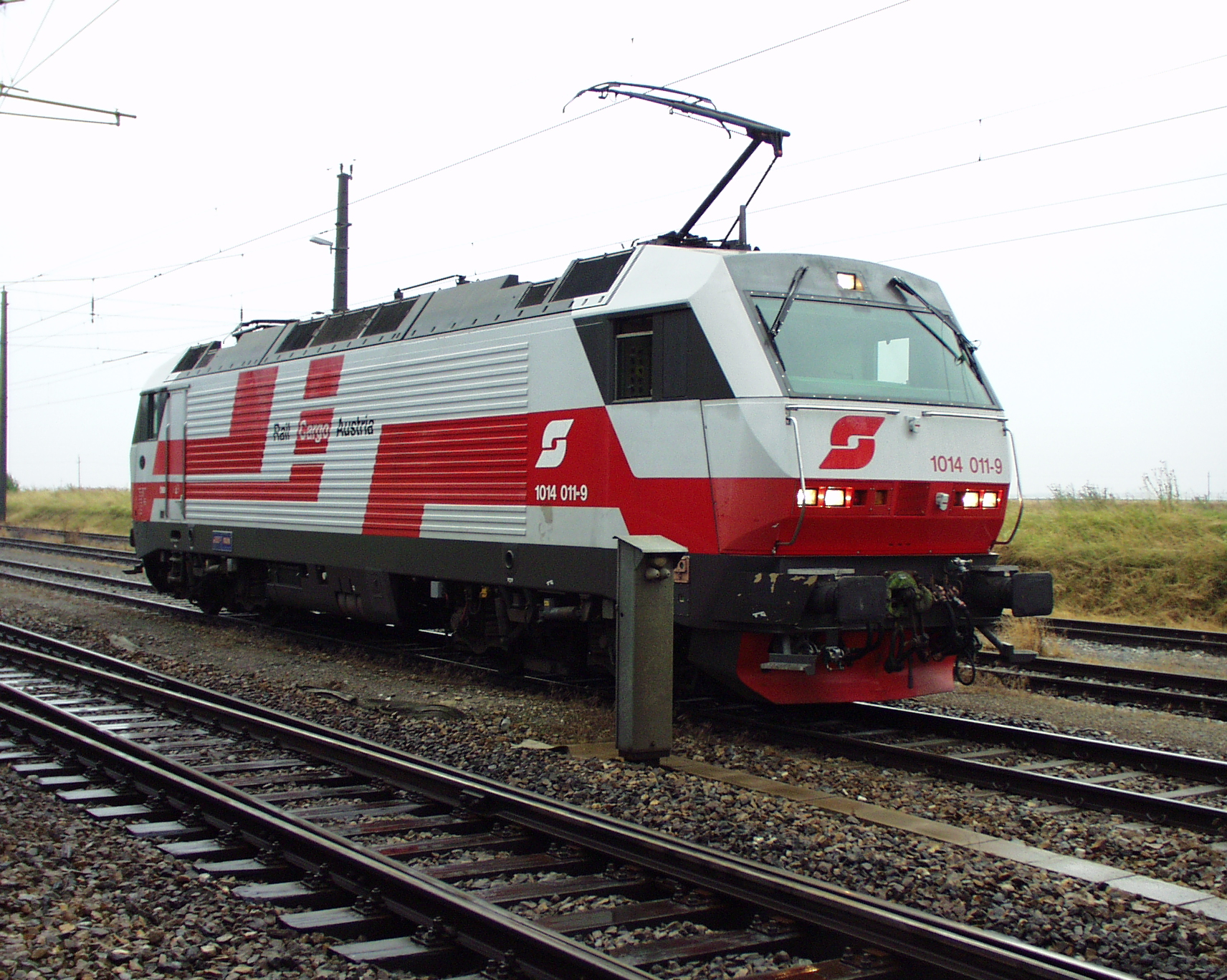 ÖBB 1014 mit RCA-Sonderlackierung